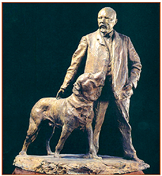 Д. Стеллецкий. Портрет Василия фон Анрепа с собакой Шамилем. 1906. Государственный Русский музей, Санкт-Петербург